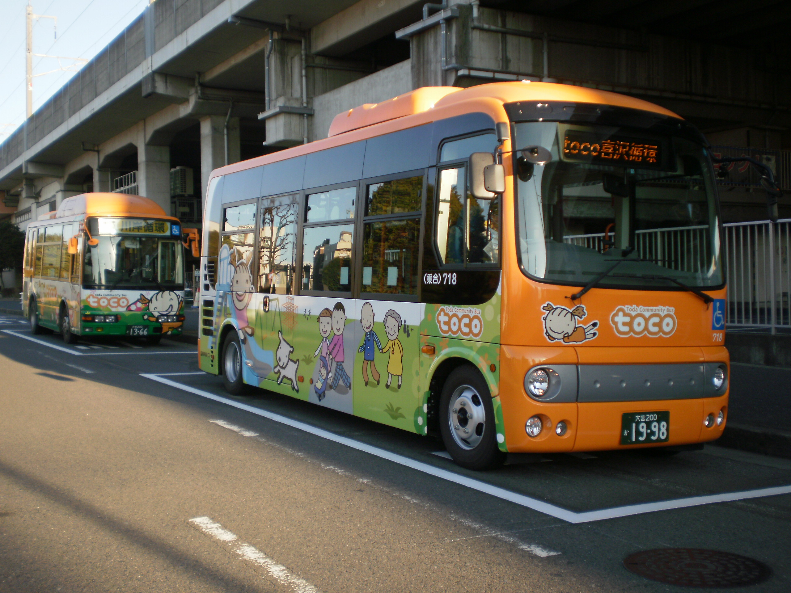 「戸田市コミュニティバス『toco』」が停車している、喜沢循環と川岸循環兼用車の計2台。 前：「元気な街」 - 喜沢循環（日野・ポンチョロング横向き：BDG-HX6JLAE/国際興業戸田営業所所属：社番・718） 後：「アリス」 - 川岸循環（三菱ふそう・エアロミディME：PA-ME17DF改/国際興業戸田営業所所属：社番・737）